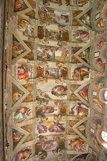 Techo de la Capilla Sixtina. The ceiling of the Sistine Chapel